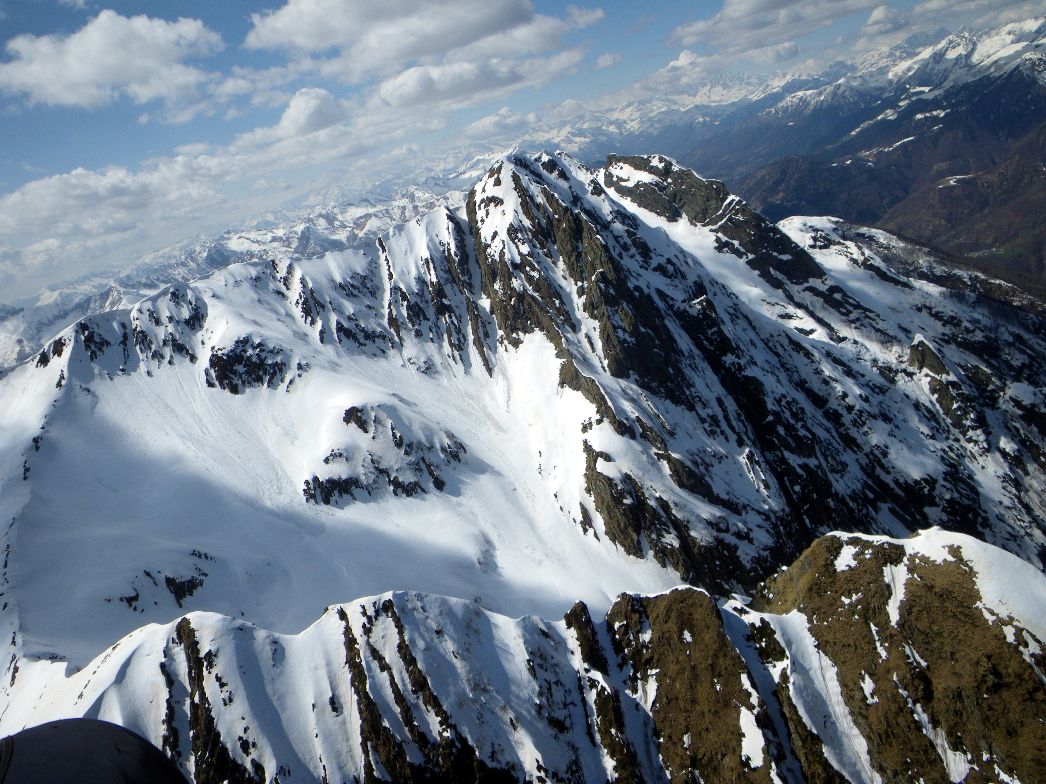 Gridon